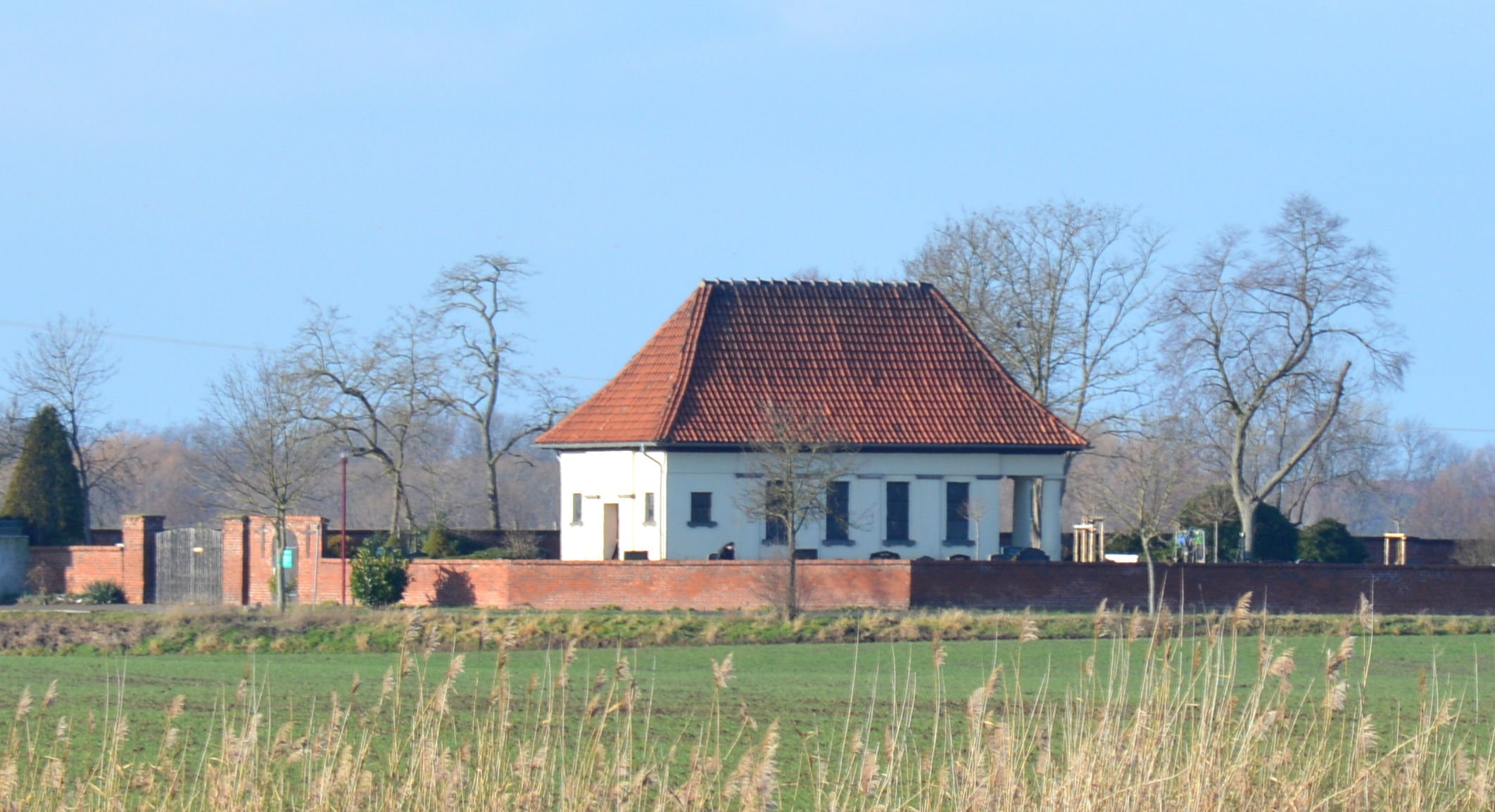 Friedhofskapelle Glindenberg